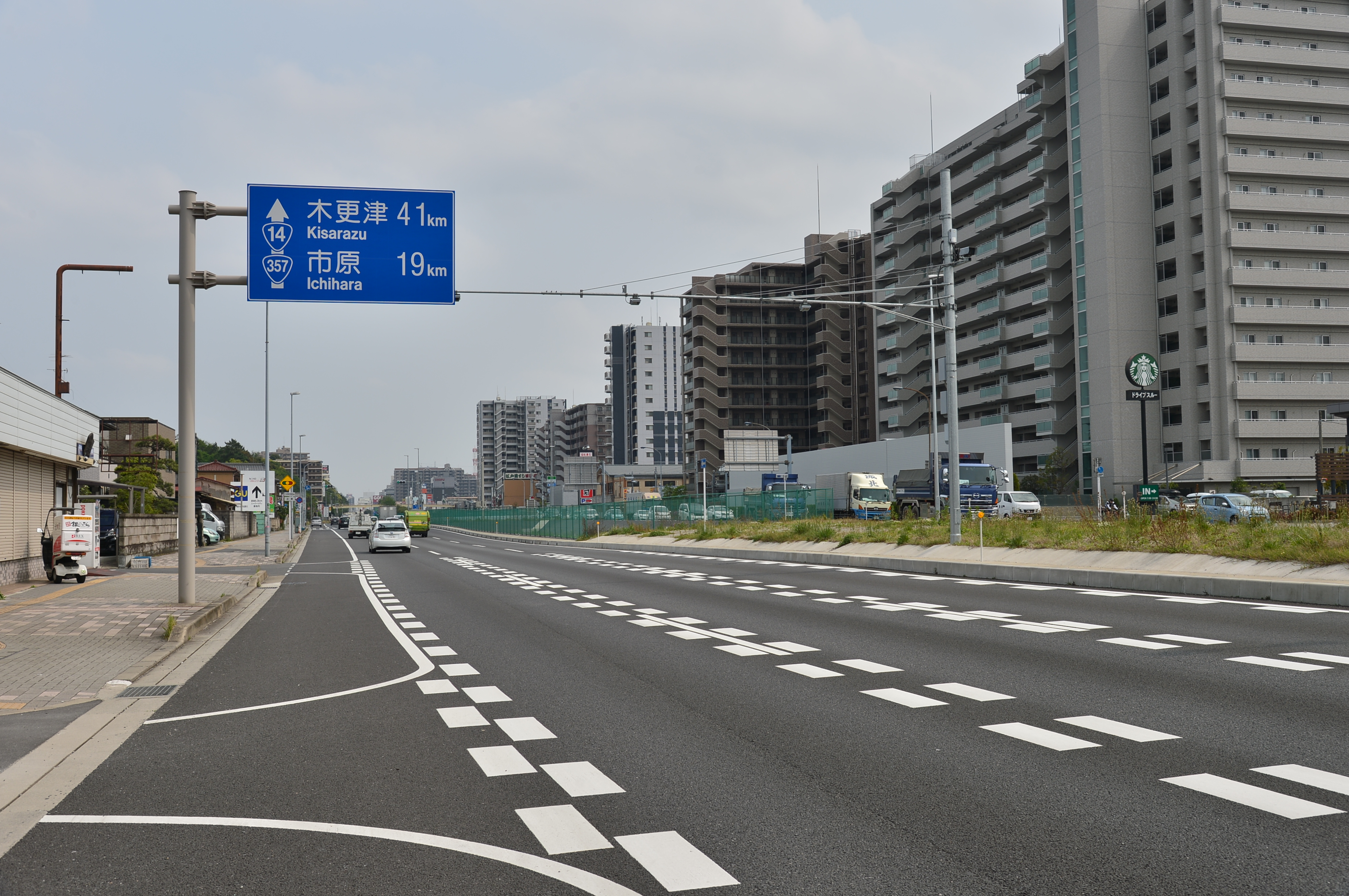 国道14号・357号重複区間（千葉市稲毛区）。運輸支局交差点付近にて。市原、木更津方面に向け撮影。